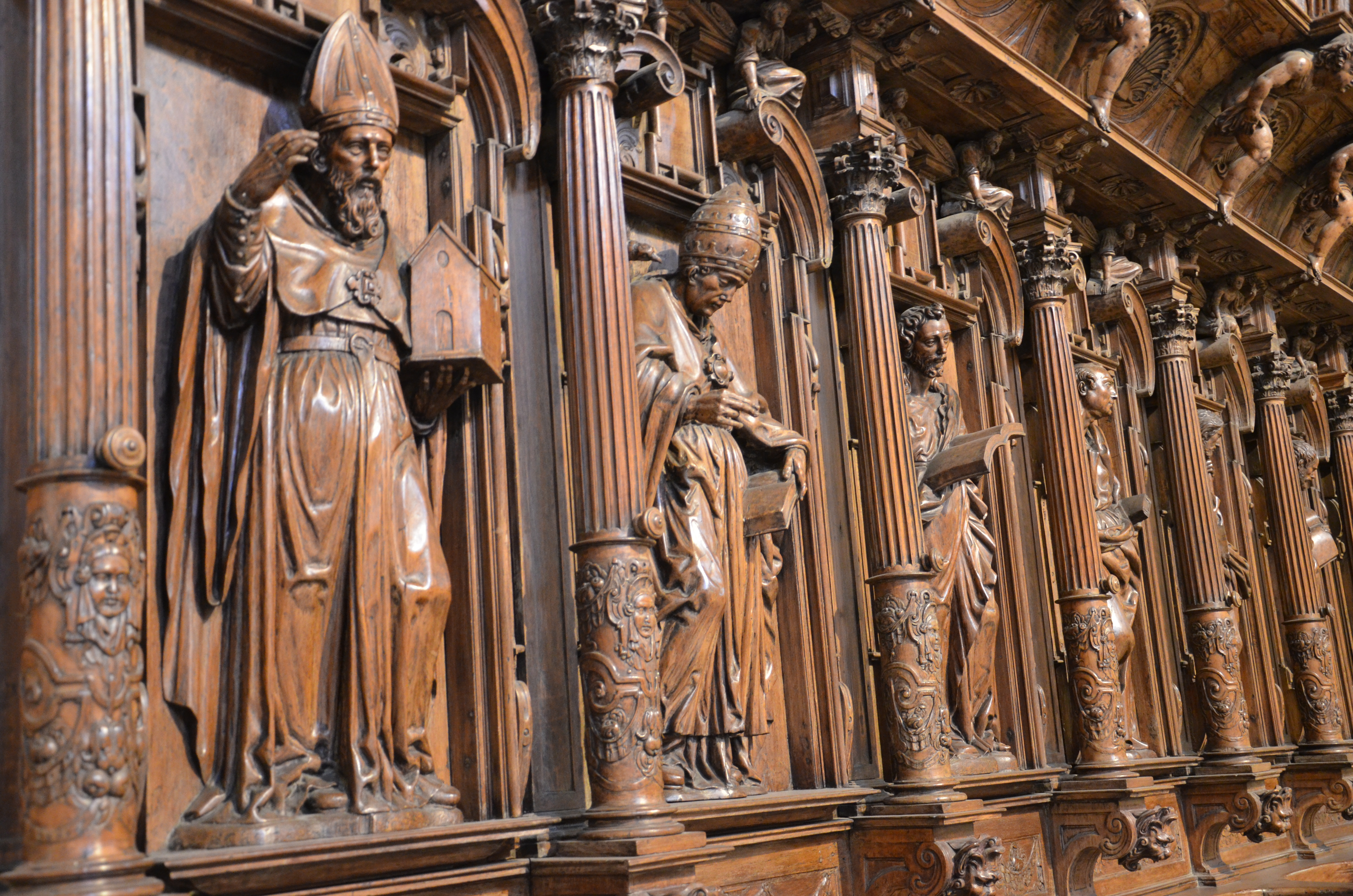 Santos y santas del sillería del coro de la Catedral de Lima